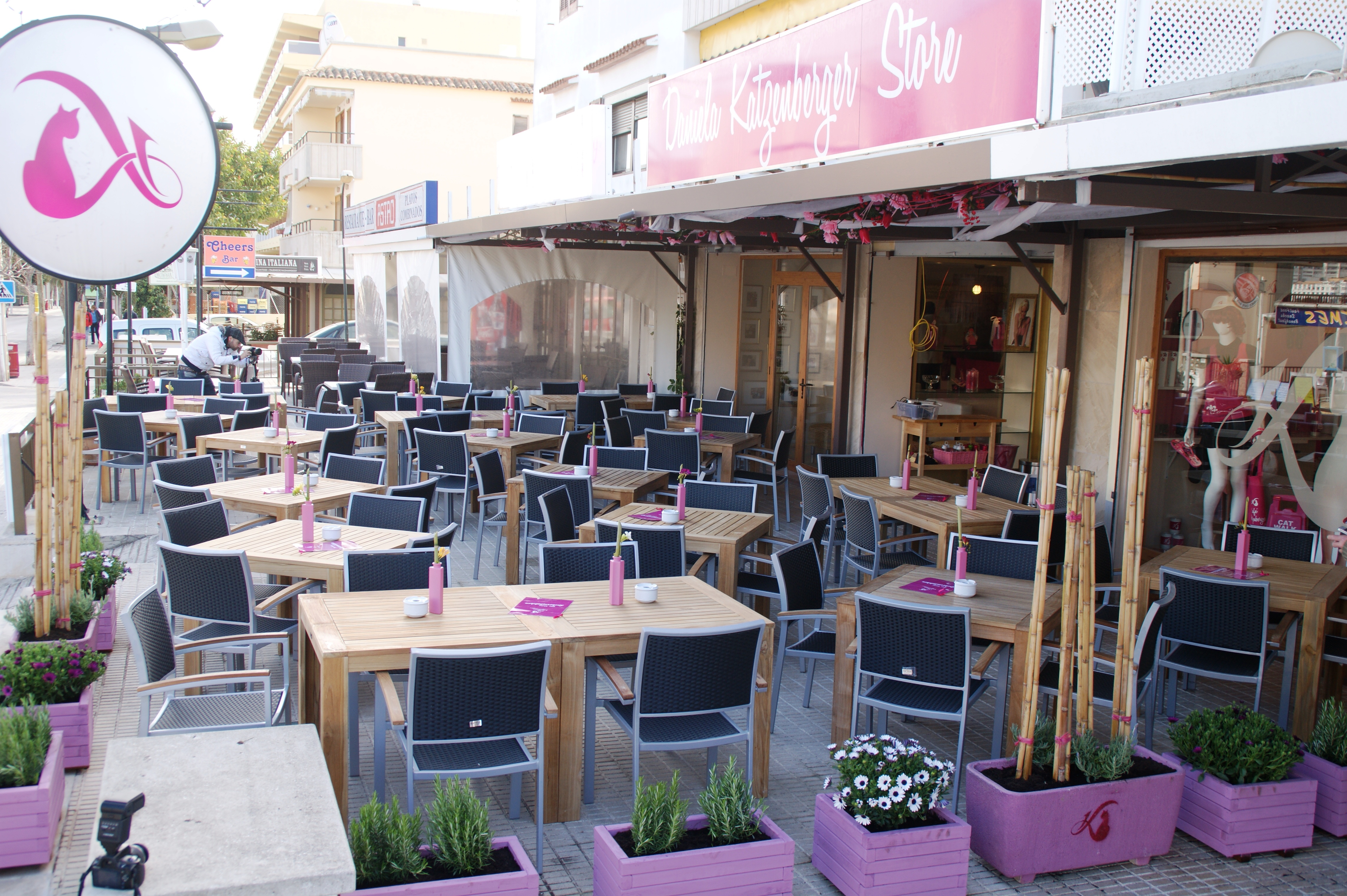 Die Terrasse des neuen Cafés Katzenberger inklusive Daniela Katzenberger Store in Santa Ponsa auf Mallorca.